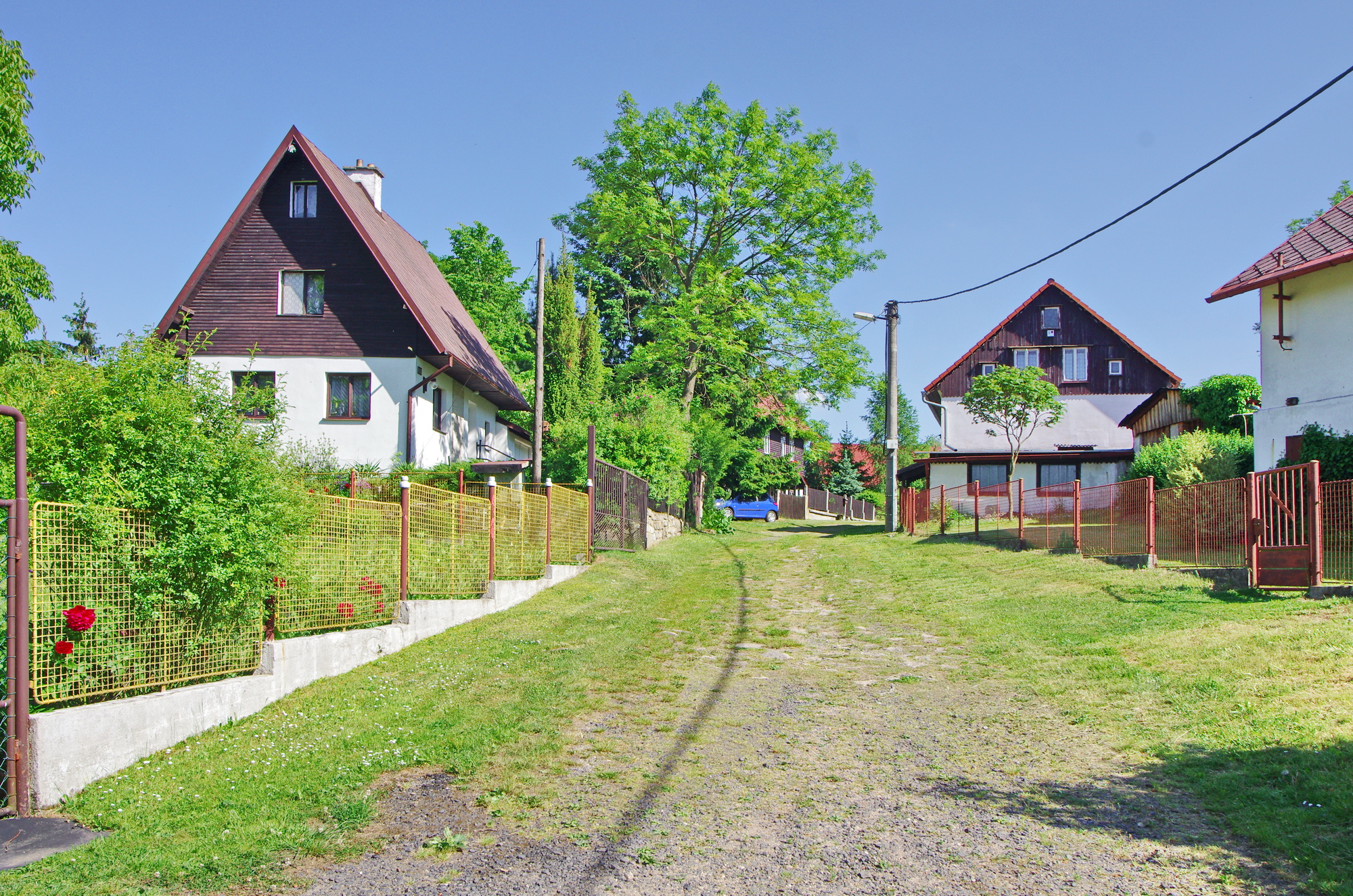 Dvory, místní část města Loket, okres Sokolov